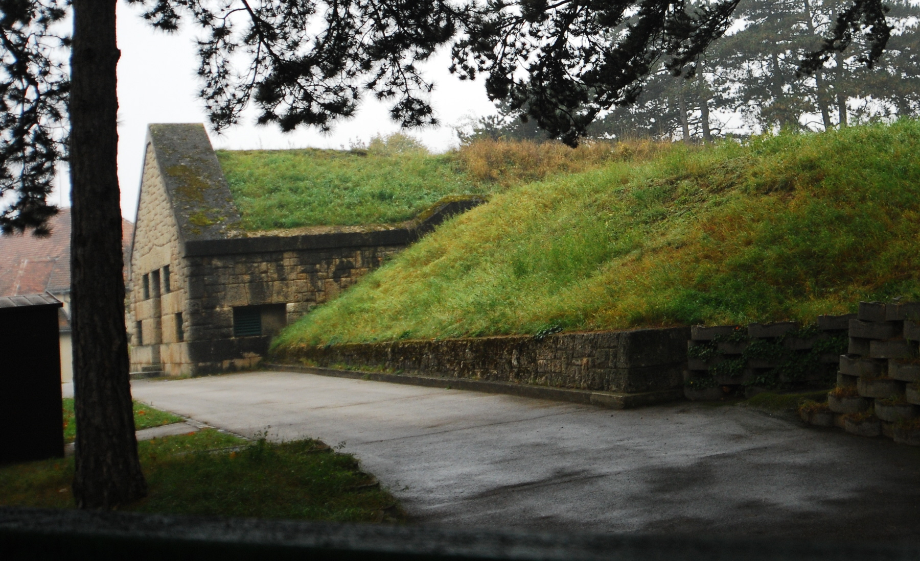 Behälter Krapfenwald der Wiener Wasserversorgung in Wien-Döbling. (besser geht es umständehalber nicht)